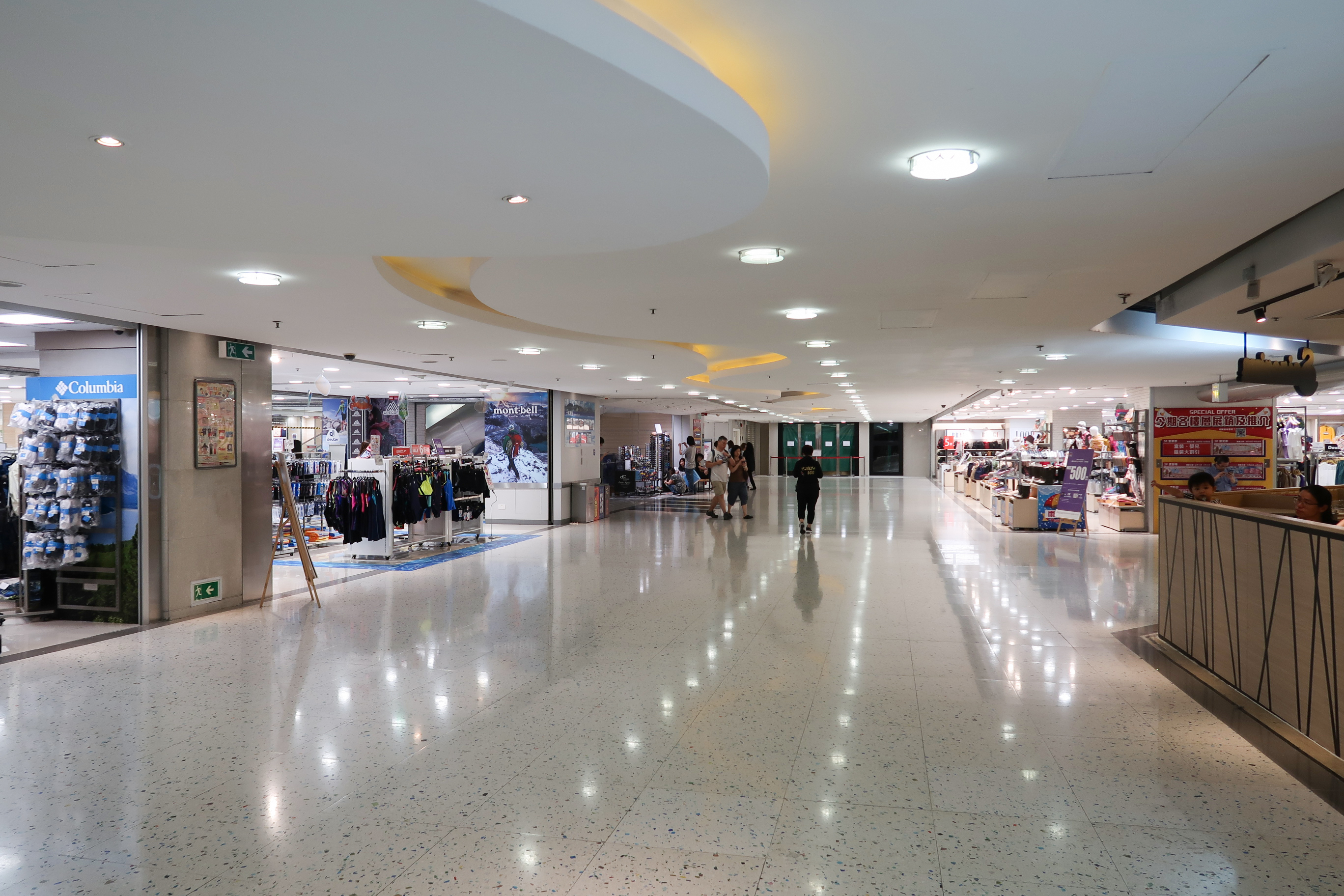 Skyline Plaza Level 1